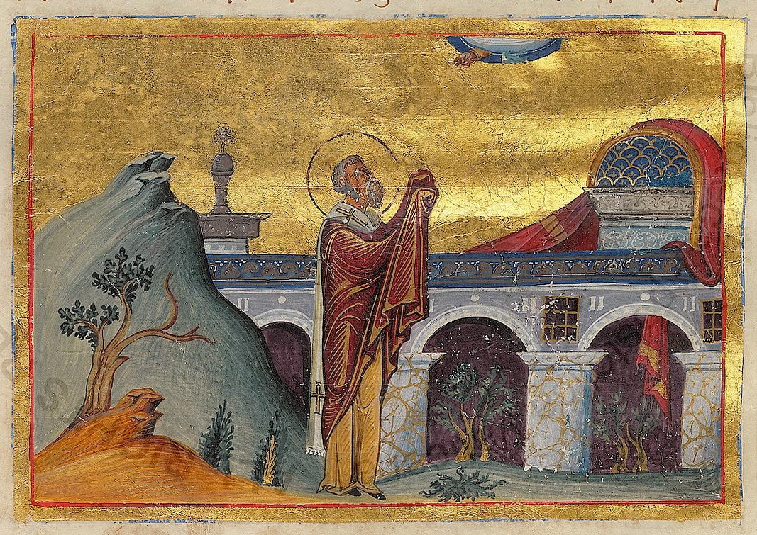 Миниатюра из Минология Василия II. 976-1025 гг.